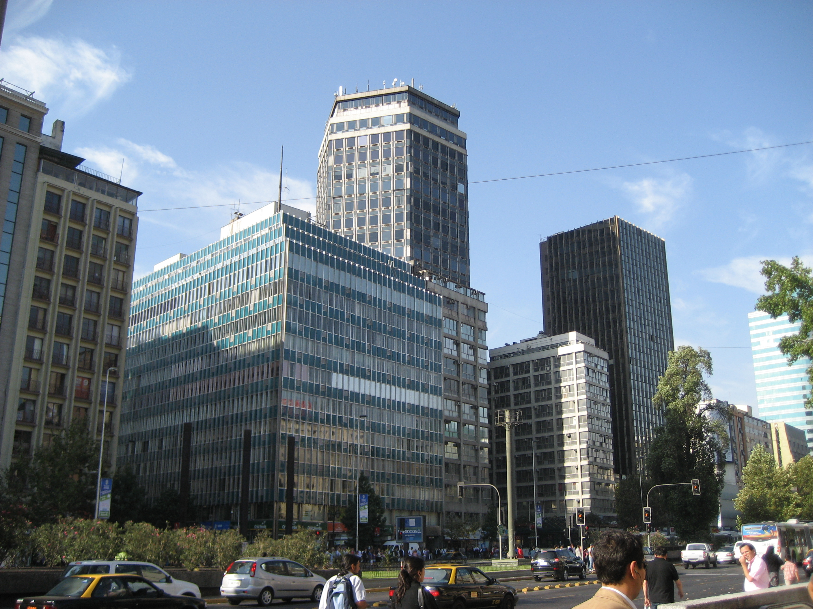 Edificio Santiago Centro, Alameda entre Paseo Ahumada y Paseo Estado.